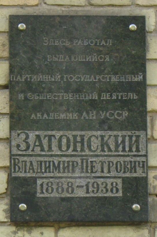 Меморіальна дошка Володимиру Затонському